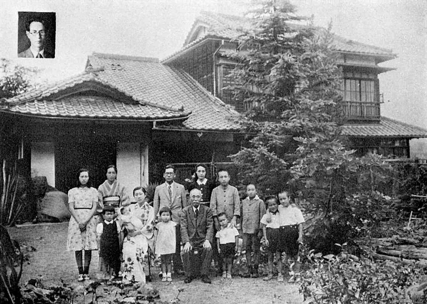 昭和22年11月当時の針塚長太郎家族